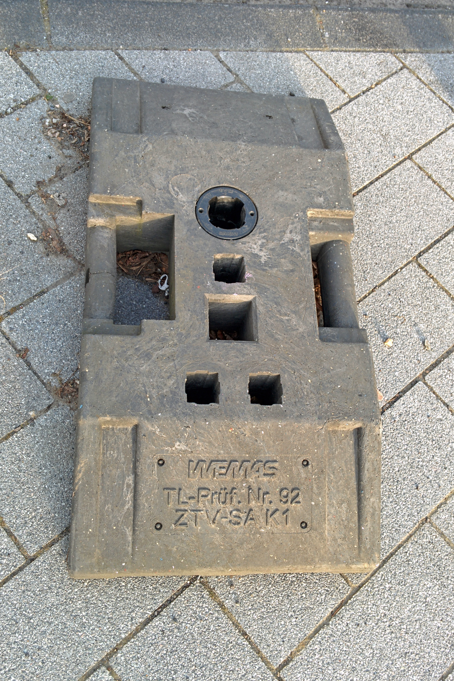 Bakenfuß, Hersteller WEMAS